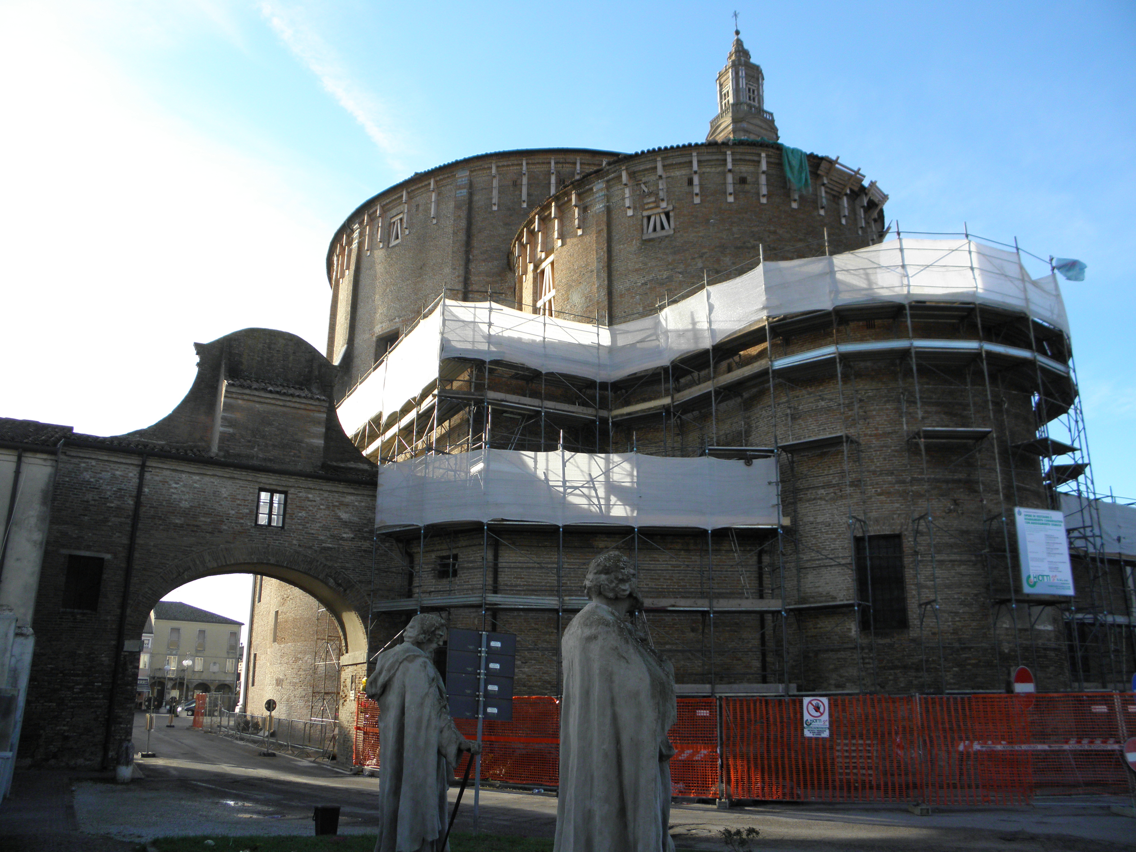 Ficarolo, la zona absidale della Chiesa arcipretale di Sant'Antonino martire. Si notino i lavori di messa in sicurezza dell'edificio a causa del terremoto dell'Emilia del 2012.